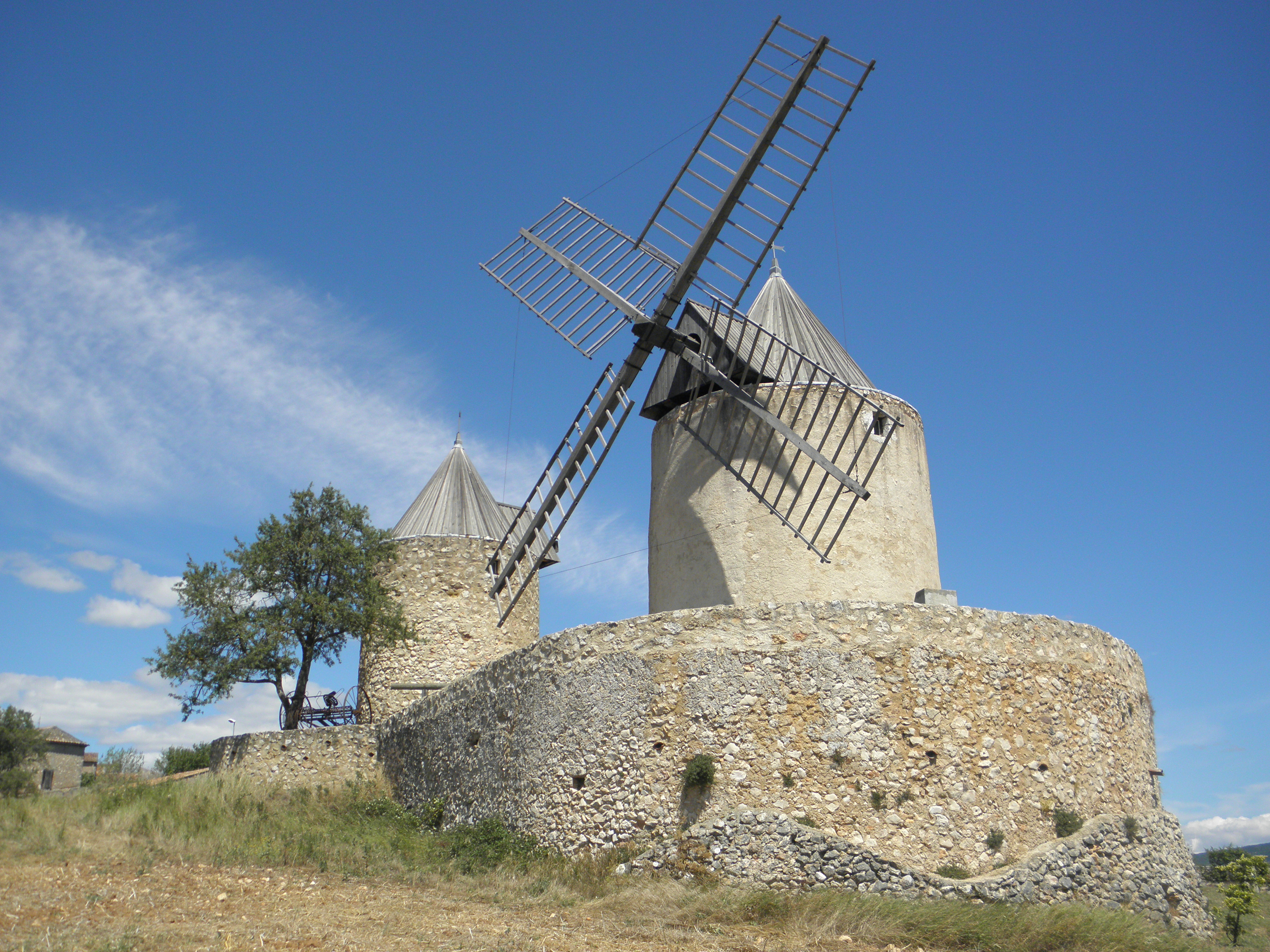 Moulins à vent de Régussesoubassement